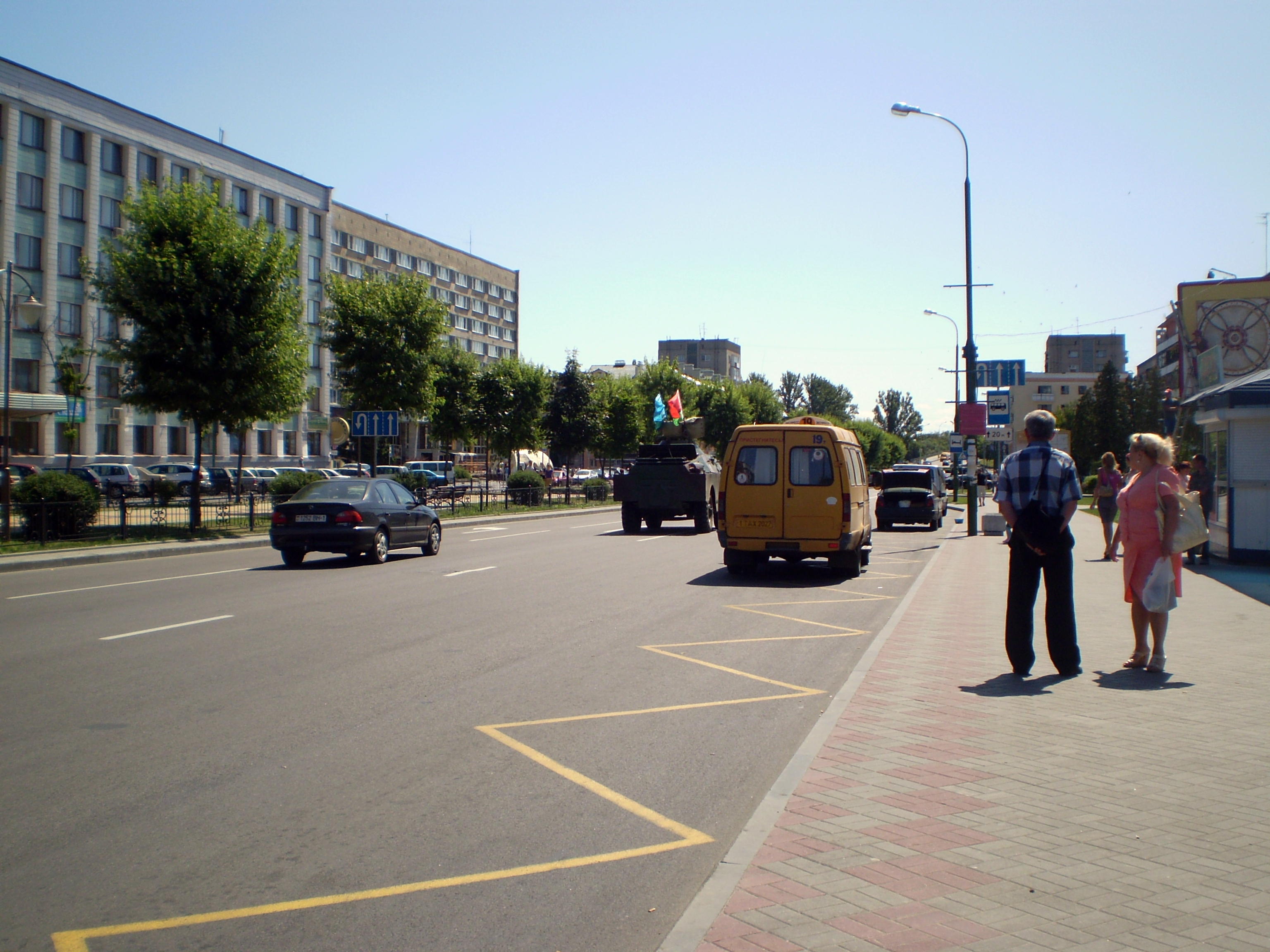 Прыпынак «Бульвар Шаўчэнкі»